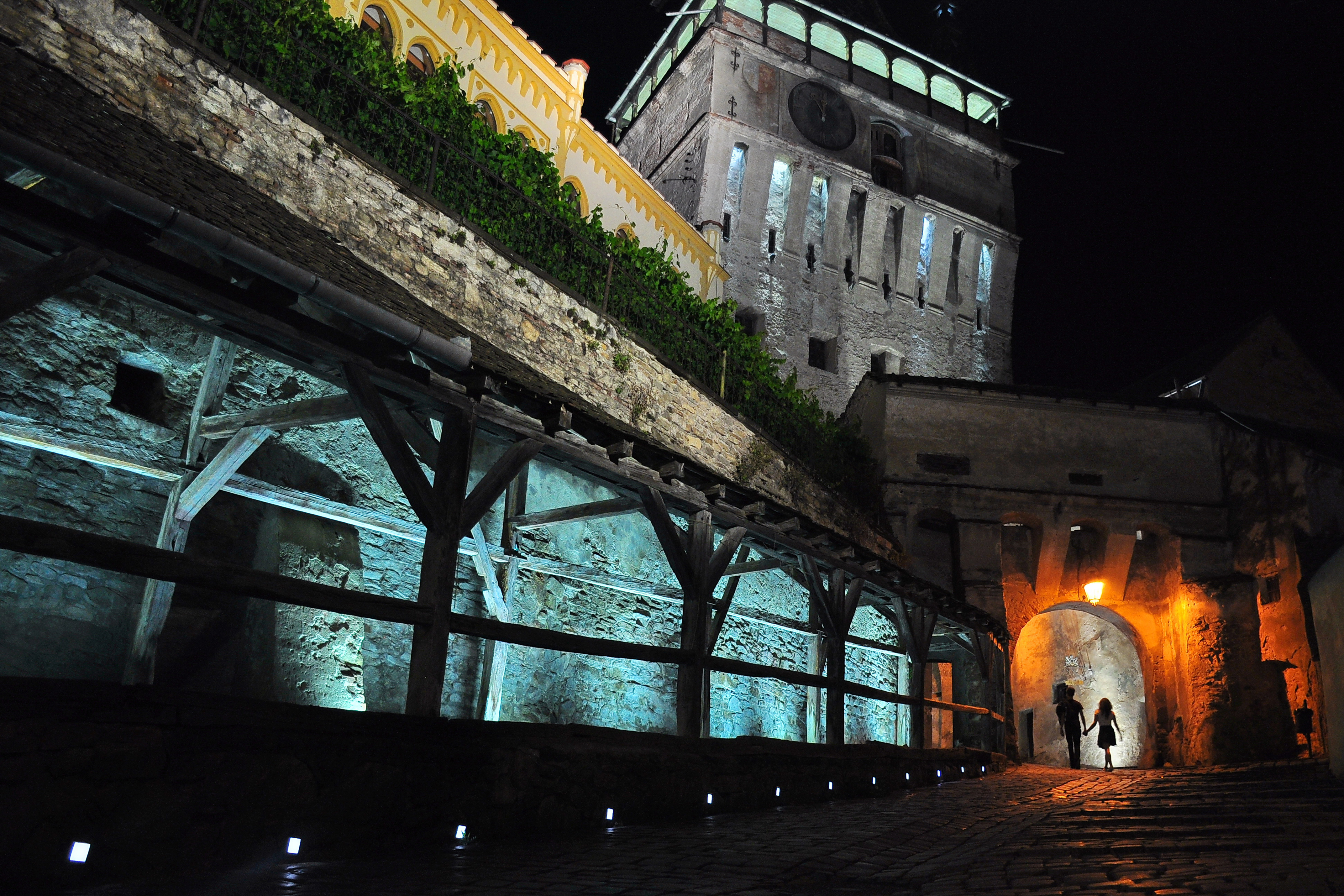 Fotografie de noapte, realizata pe Strada Turnului din Cetatea Sighisoara